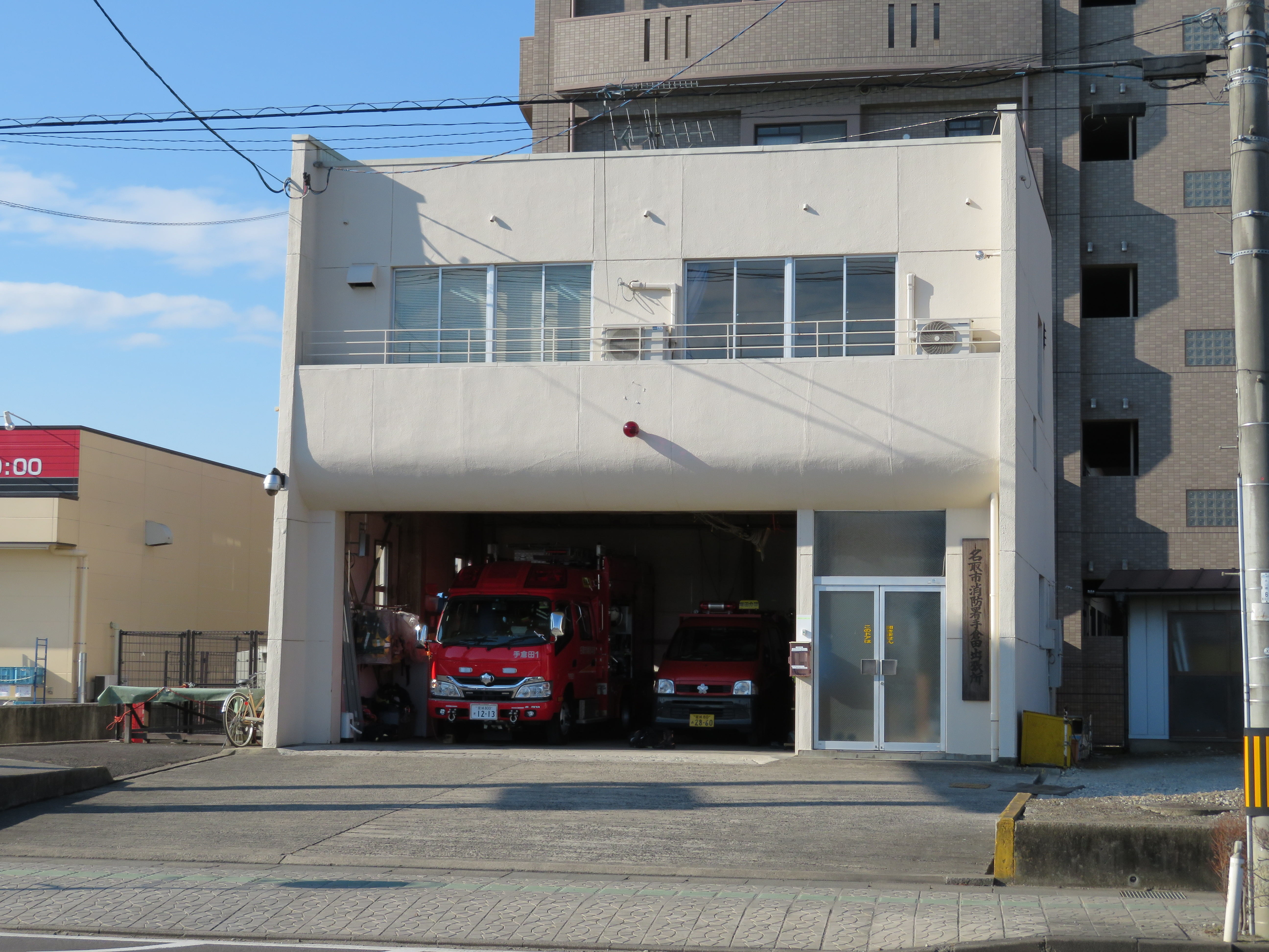 名取市消防本部・消防署手倉田出張所庁舎 Canon PowerShot SX720 HS